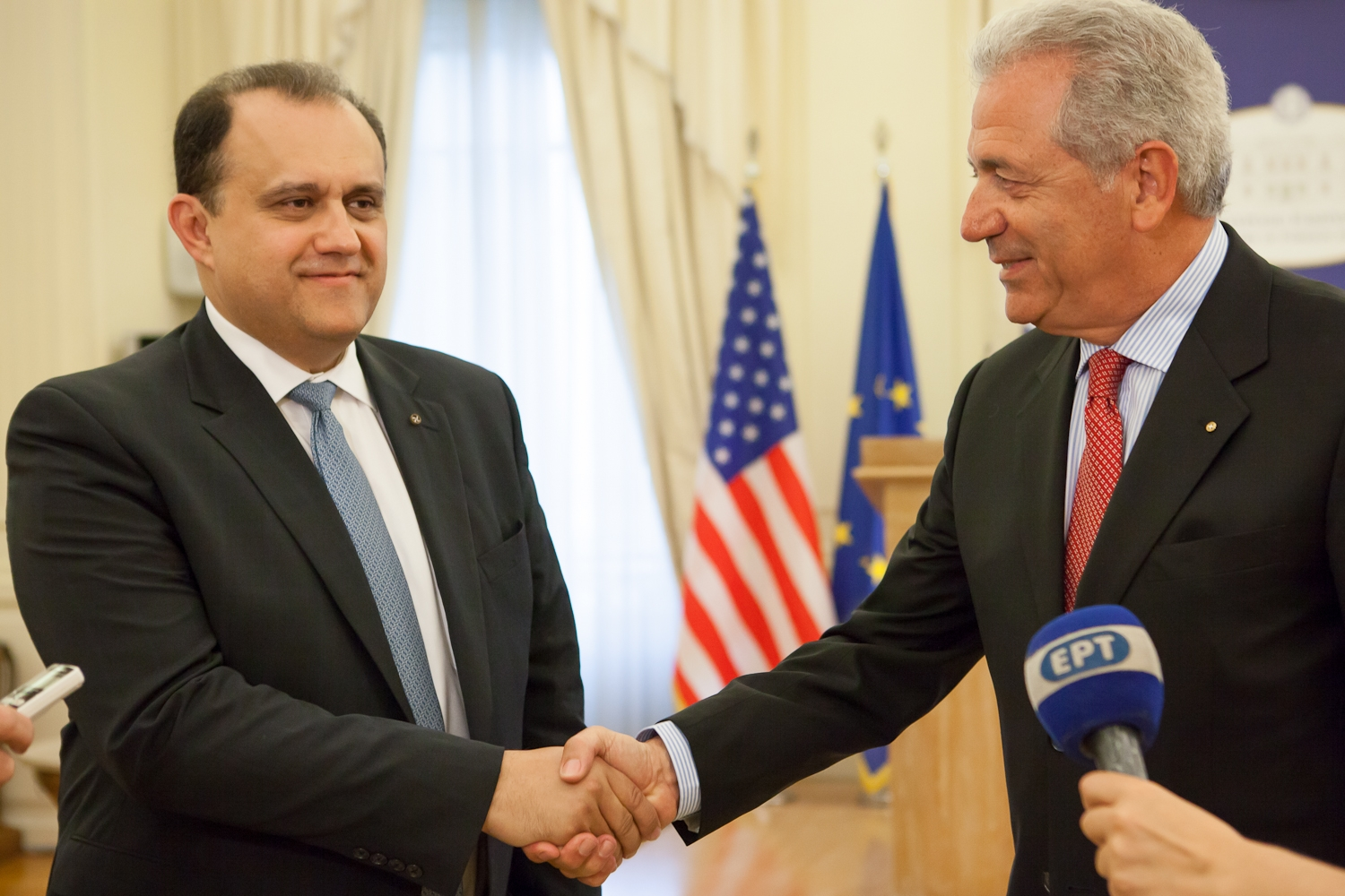 Την Δευτέρα 13 Μαΐου 2013, ο Υπουργός Εξωτερικών Δημήτρης Αβραμόπουλος είχε συνάντηση στο Υπουργείο Εξωτερικών με τον Πρόεδρο και μέλη του Διοικητικού Συμβουλίου της Ελληνοαμερικανικής Οργάνωσης American Hellenic Institute (AHI).